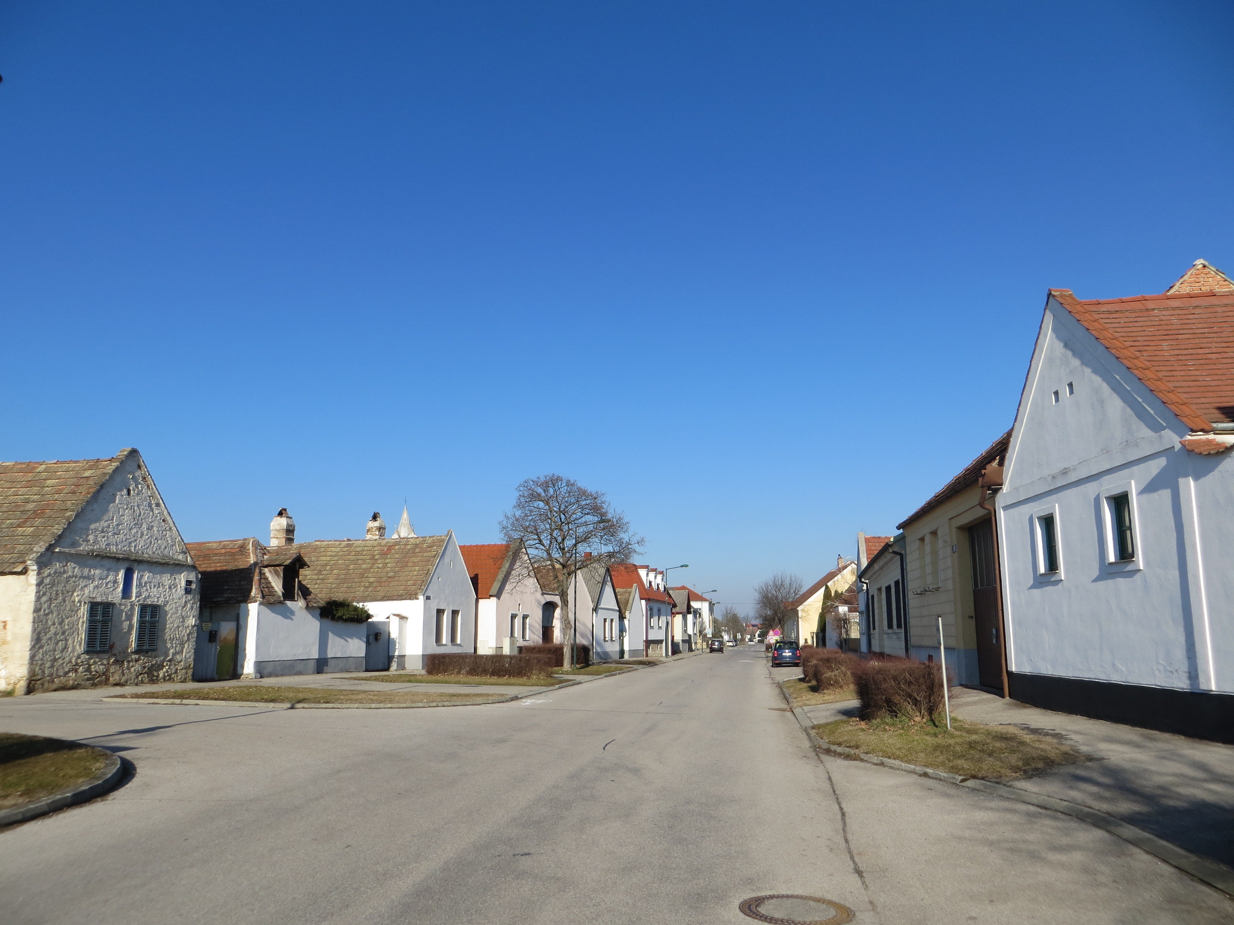 Ansicht der Hauptstraße in Oslip